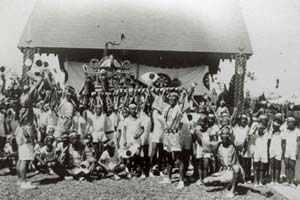 japan emigrant in Taiwan zn:日本移民村